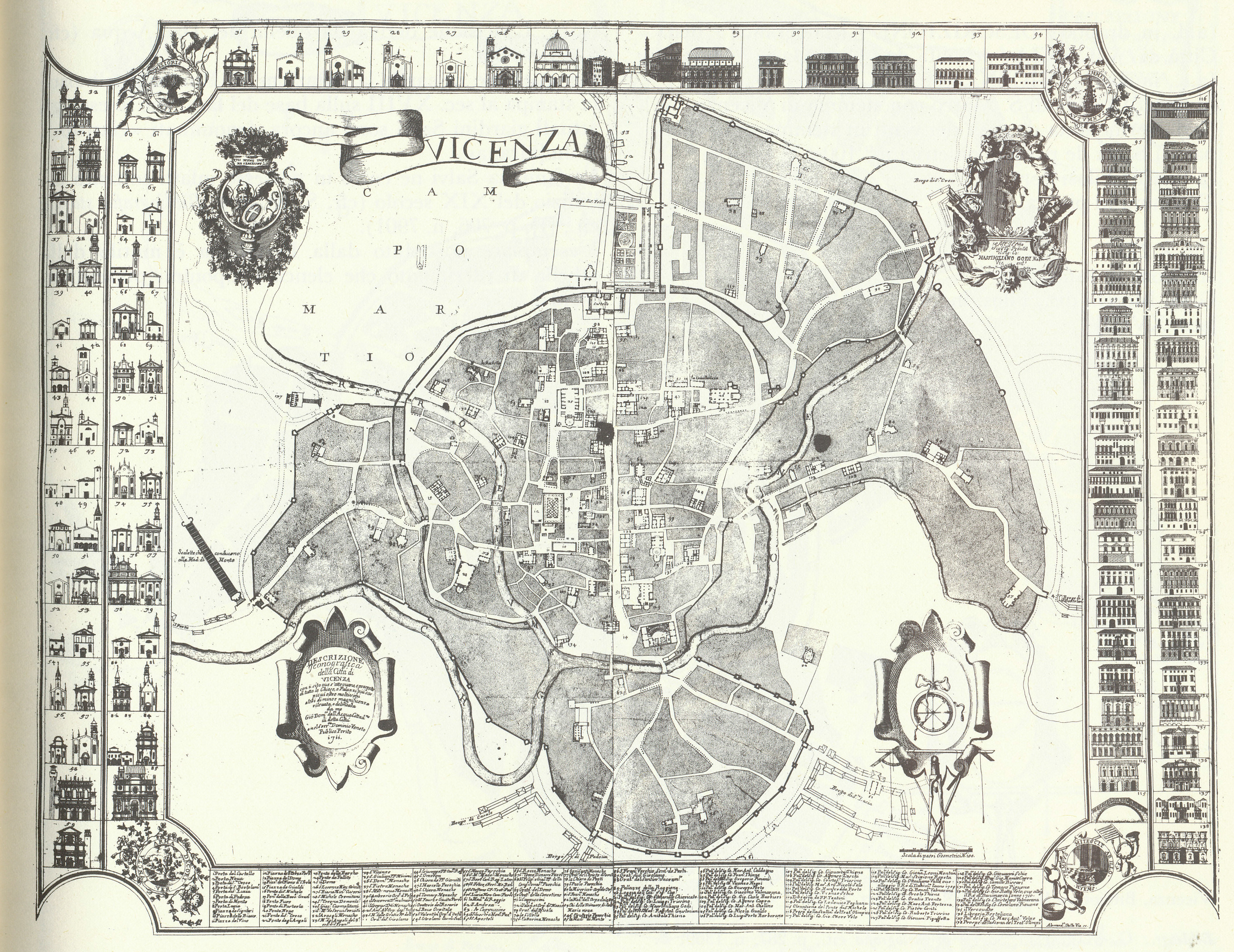 Vicenza - Pianta di Vicenza di G.D. Dall'Acqua, 1711